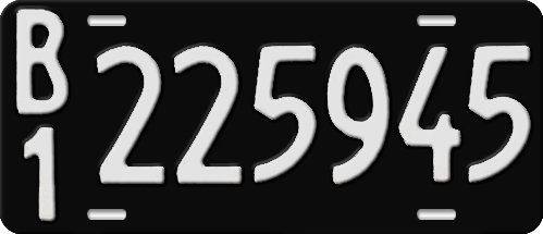 Última versión de la anterior matrícula de Argentina, obligatoria para todos los vehículos de uso particular, así como también para el transporte público y de cargas.